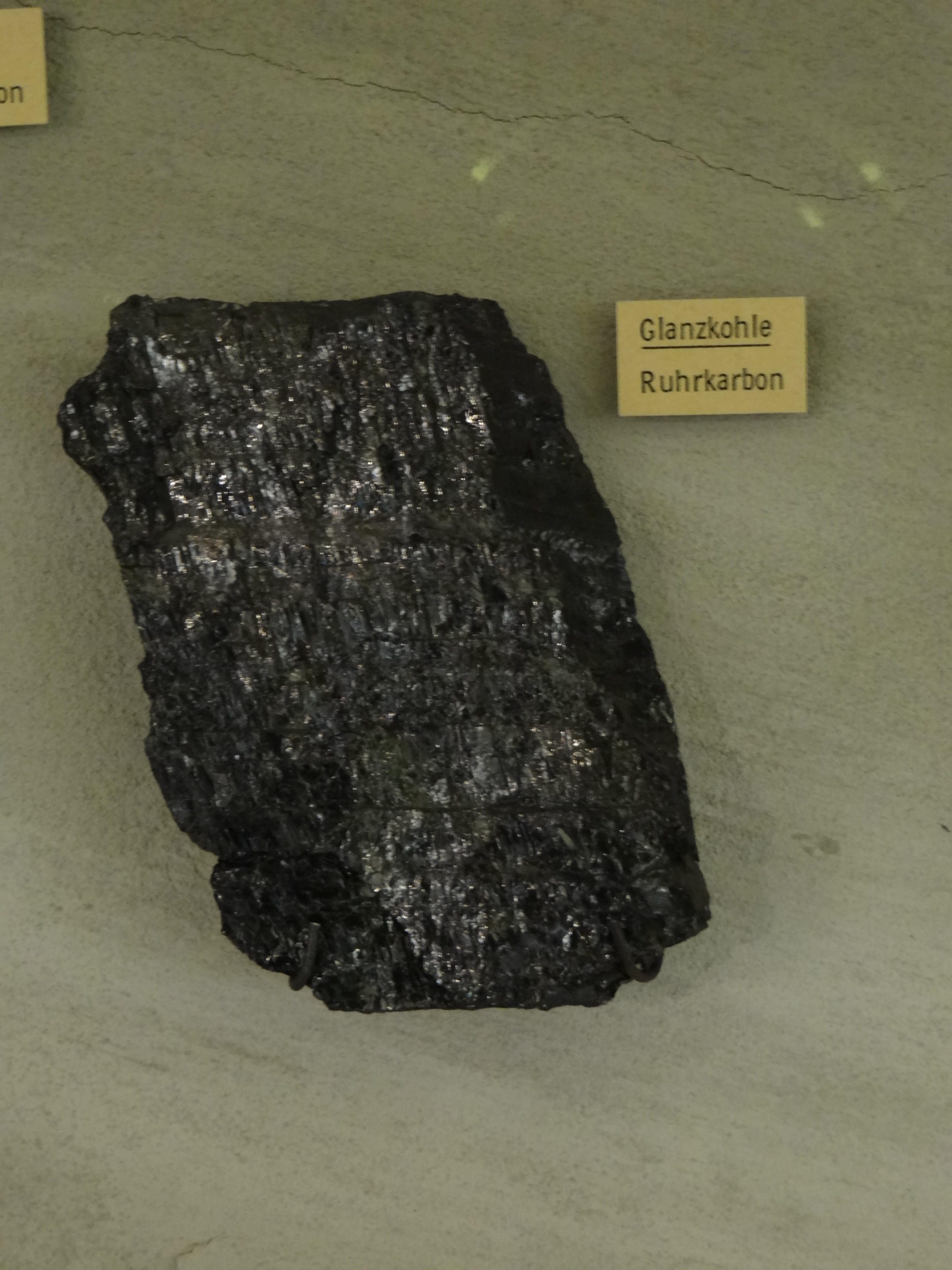 Glanzkohle, Exponat im Deutschen Bergbau-Museum Bochum